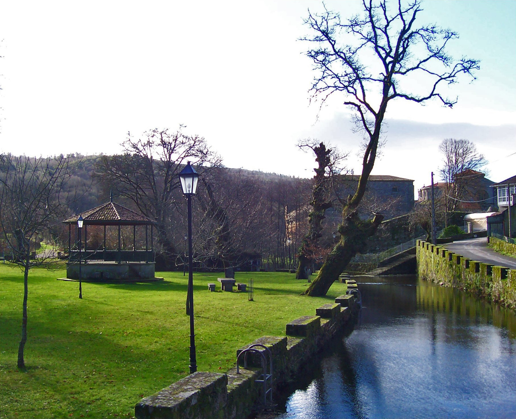 Oseira, San Cristovo de Cea, Galicia (Spain). Río Oseira